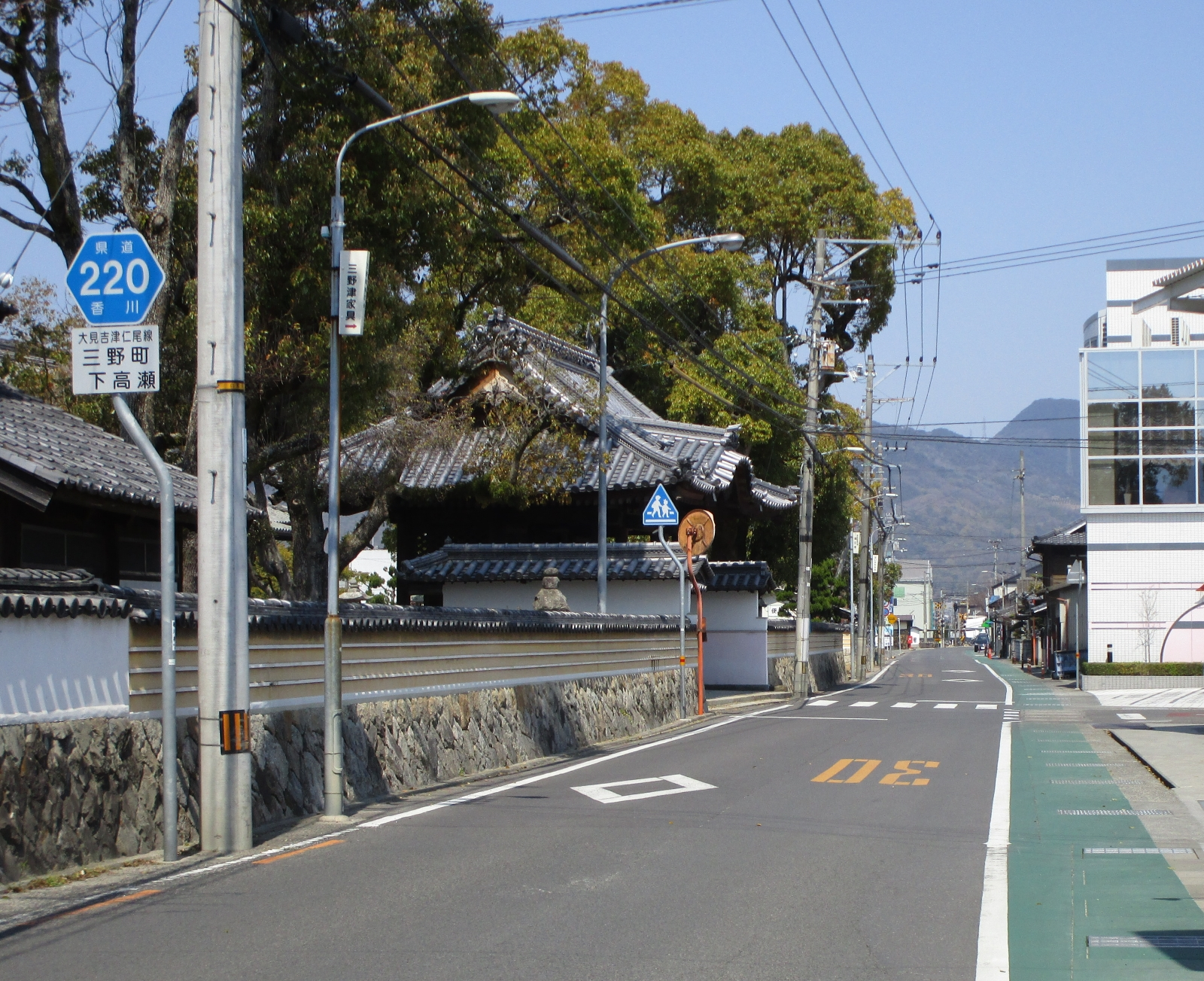 香川県道220号大見吉津仁尾線（三豊市三野町下高瀬、本門寺付近より撮影）